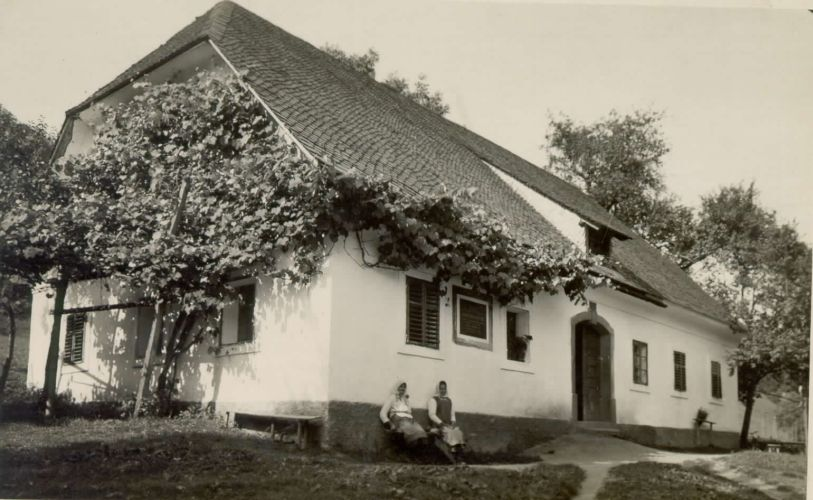 Rojstna hiša Frana Maselja - Podlimbarskega